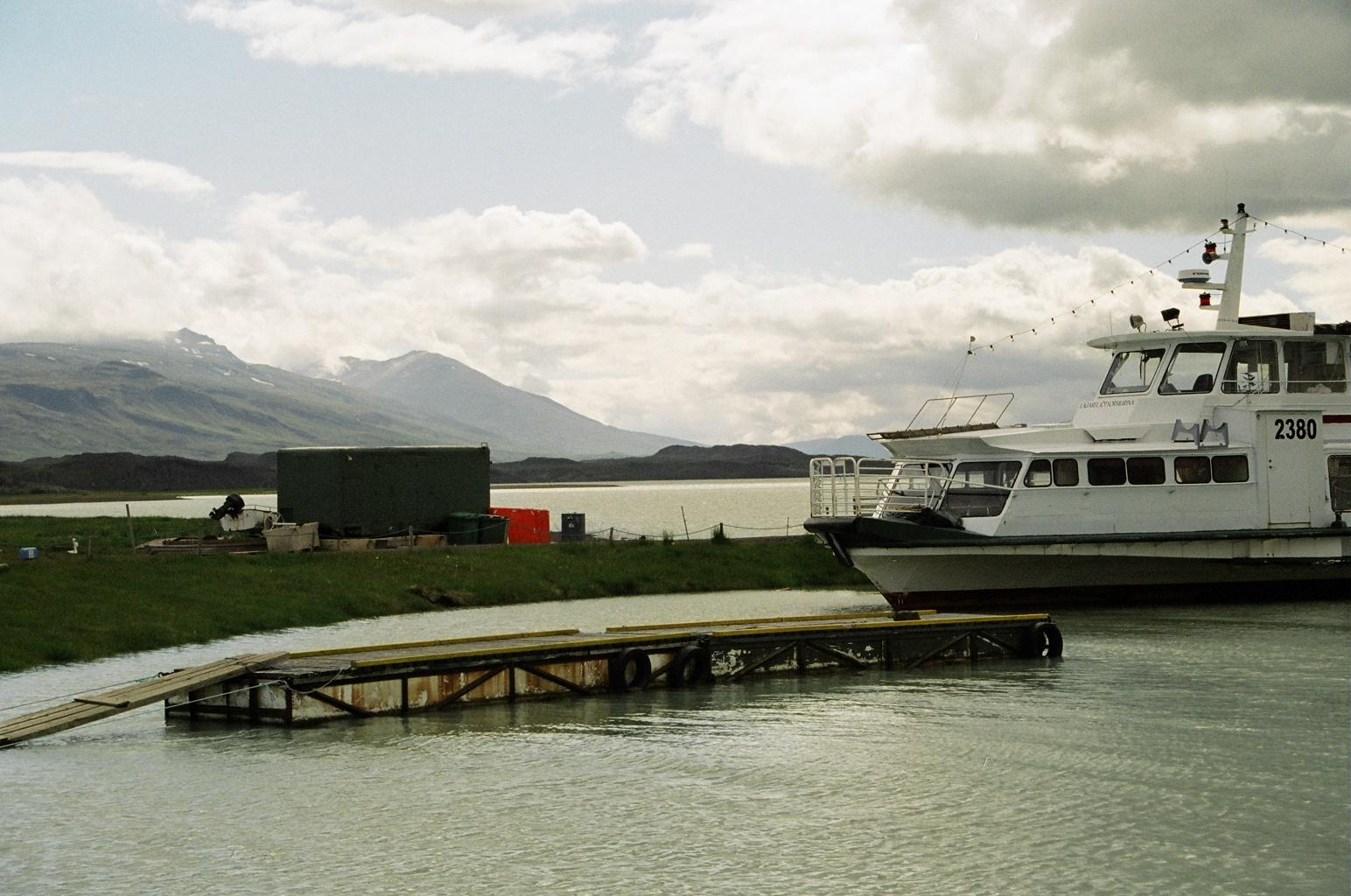 Das Bild zeigt das Boot Lagafljótsormurinn auf dem gleichnamigen See bei Egilsstadir in Island.